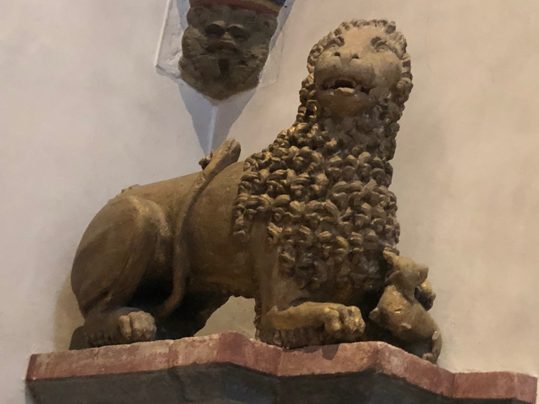 Romanischer Löwe mit Lamm in St Gereon, Köln Deutschland